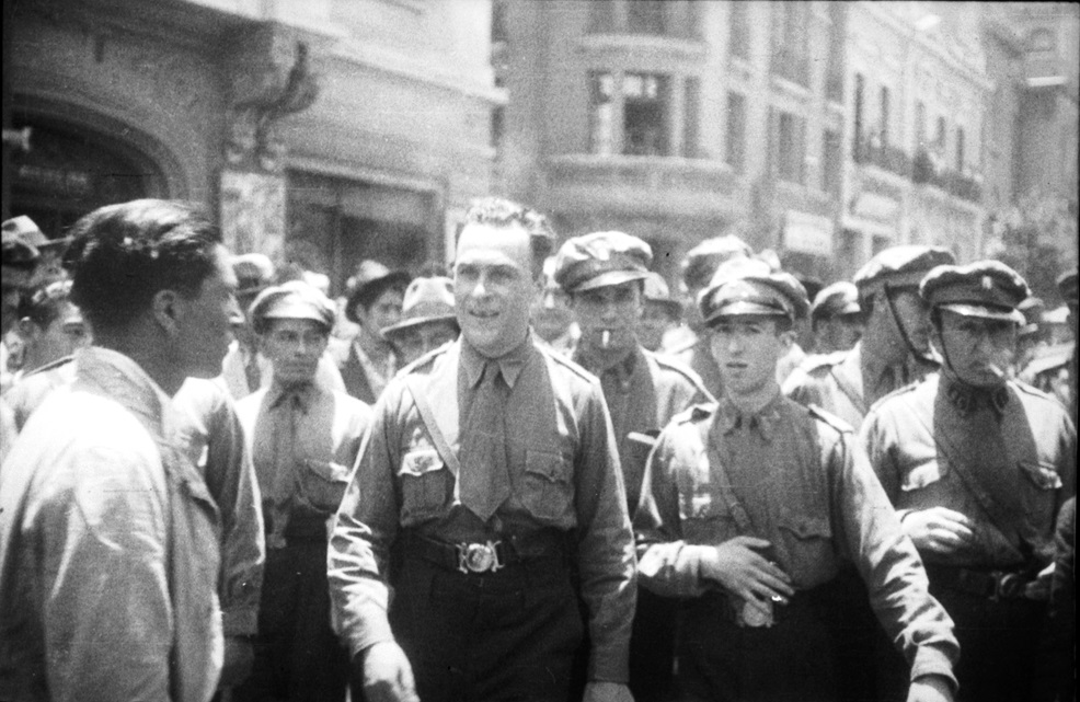 Jorge González Von Marées, jefe V.P.S.